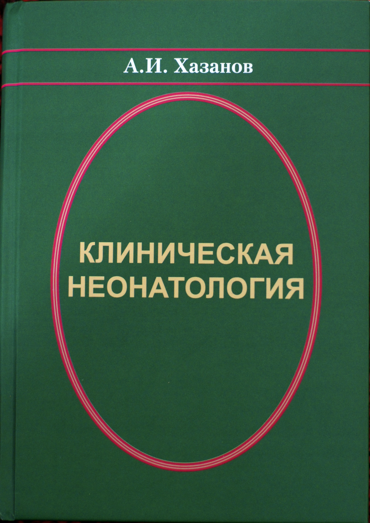 Руководство А. И. Хазанова по Неонатологии